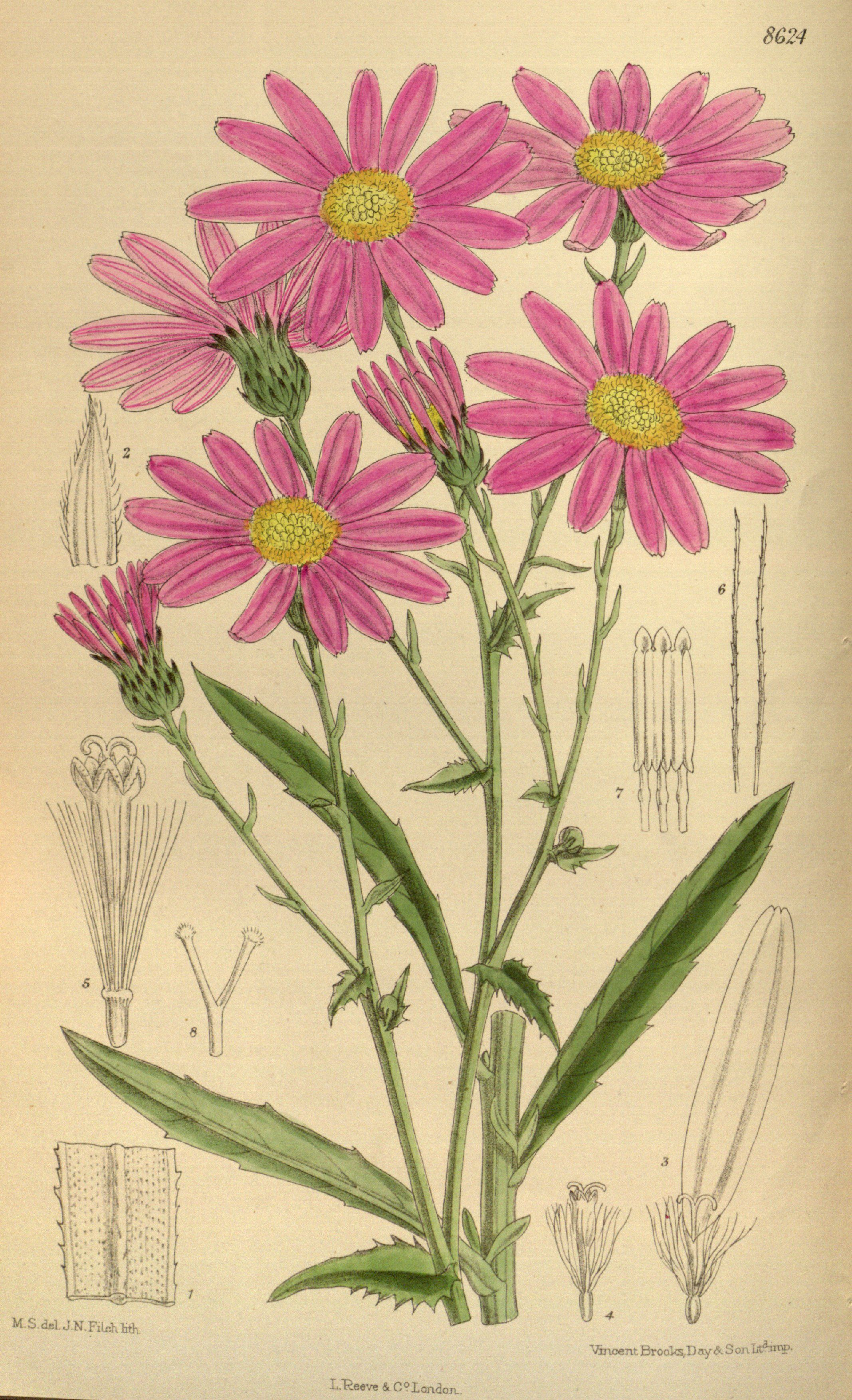 Senecio glastifolius, Asteraceae